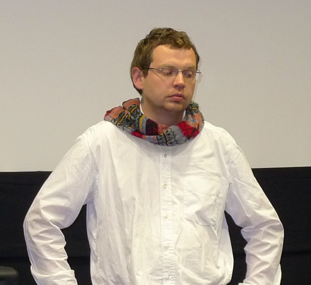 Režisér dokumentárních filmů Vít Klusák